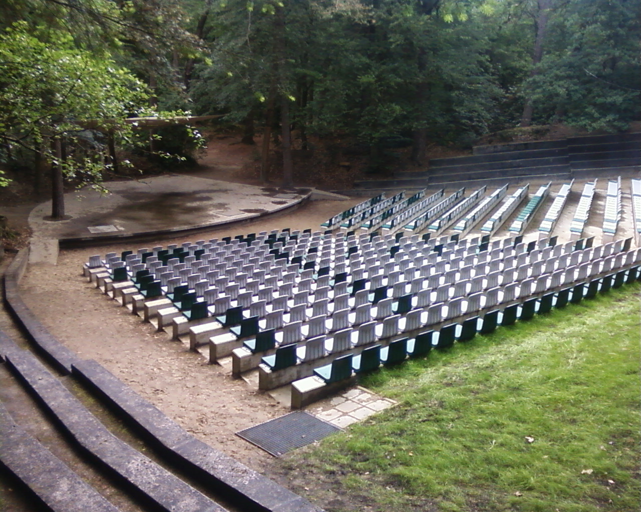 It iepenloftteater op de Boskberch, súdwestlik fan Appelskea.